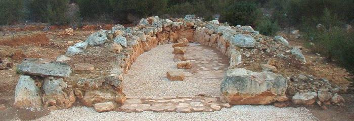 Naveta I Closos de can Gaia. Portocolom, Felanitx - Mallorca